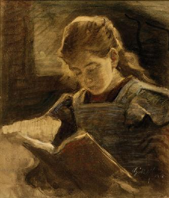 Lezend Meisje (sari), door haar vader Moritz Goth ( 2 maart 1873 - Amsterdam, 1944). Gesigneerd en gedateerd 1908 r.o. Krijt en aquarel